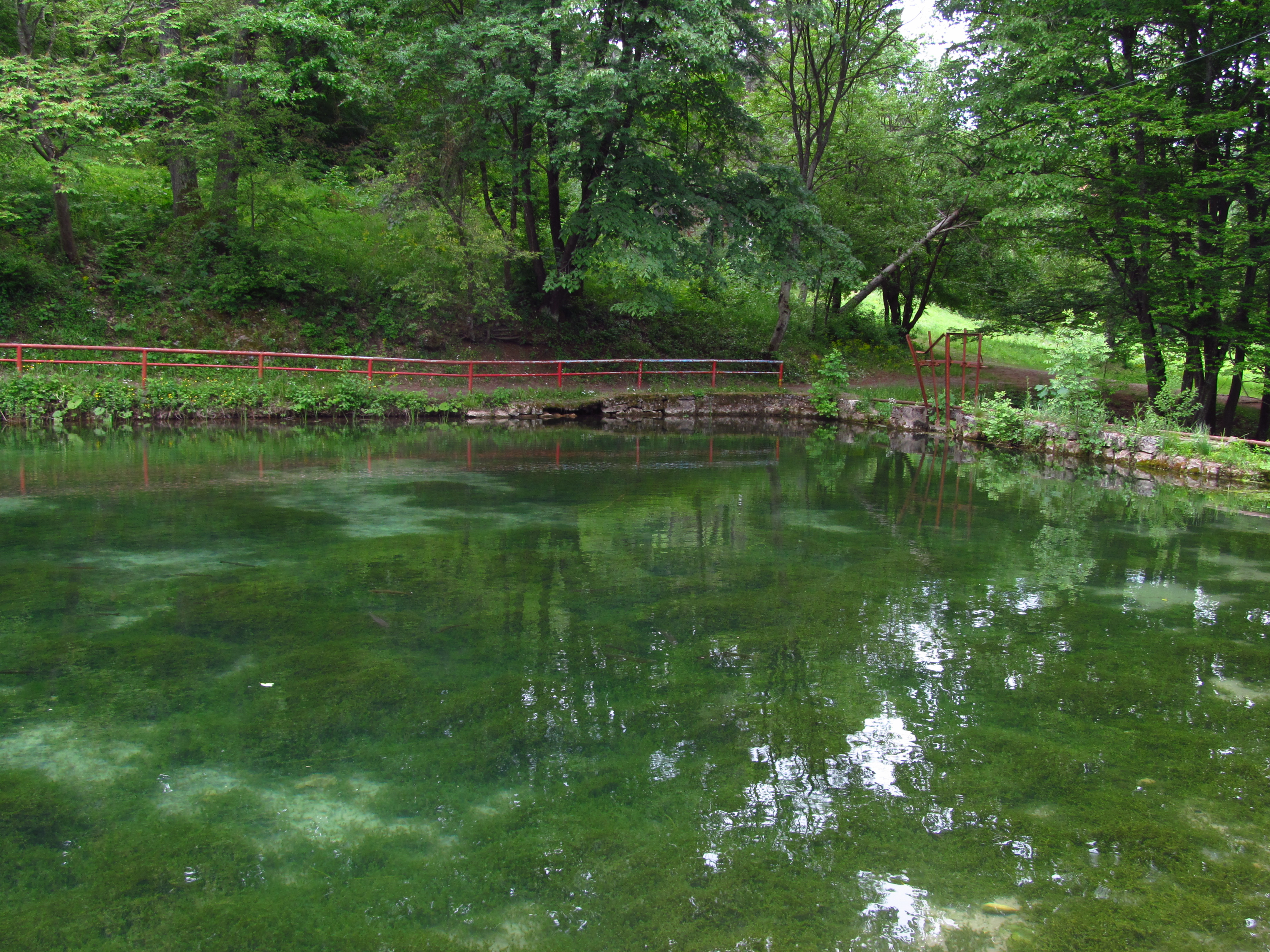 Srpski (latinica): pastrmski ribnjak, tepisi Chara spp.